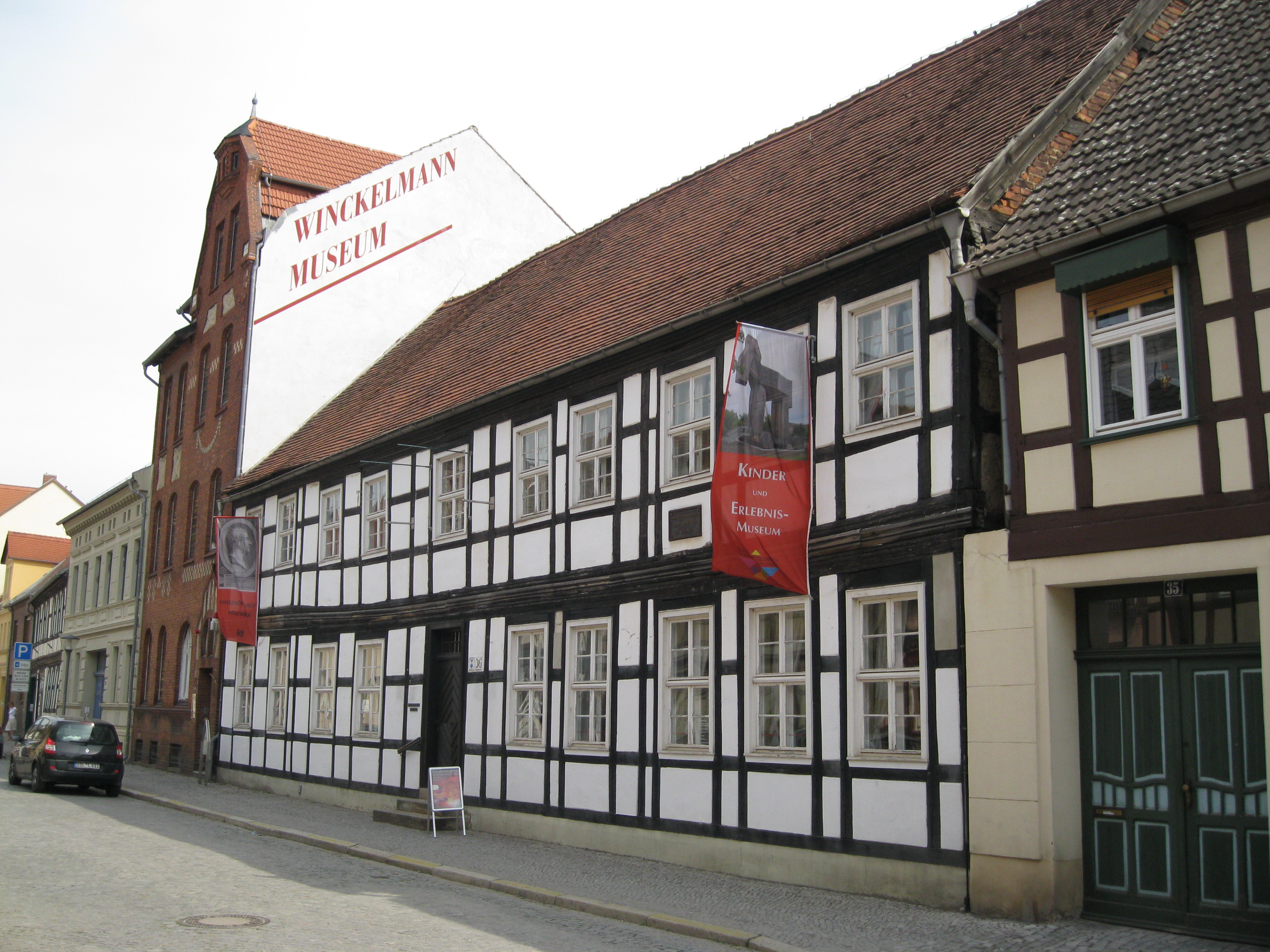 Stendal Winckelmannmuseum